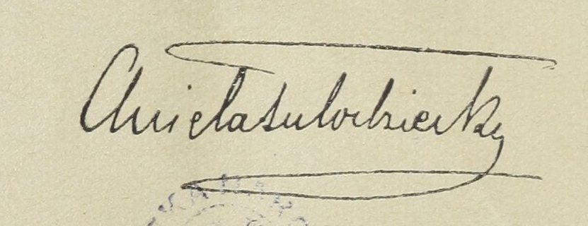 Podpis Anieli Tułodzieckiej z publikacji: "Przemówienia wygłoszone na wieczorze ku czci Anieli Tułodzieckiej w dn. 2 kwietnia 1933 r." Poznań, 1933. Całość publikacji dostępna w archiwum Polona.